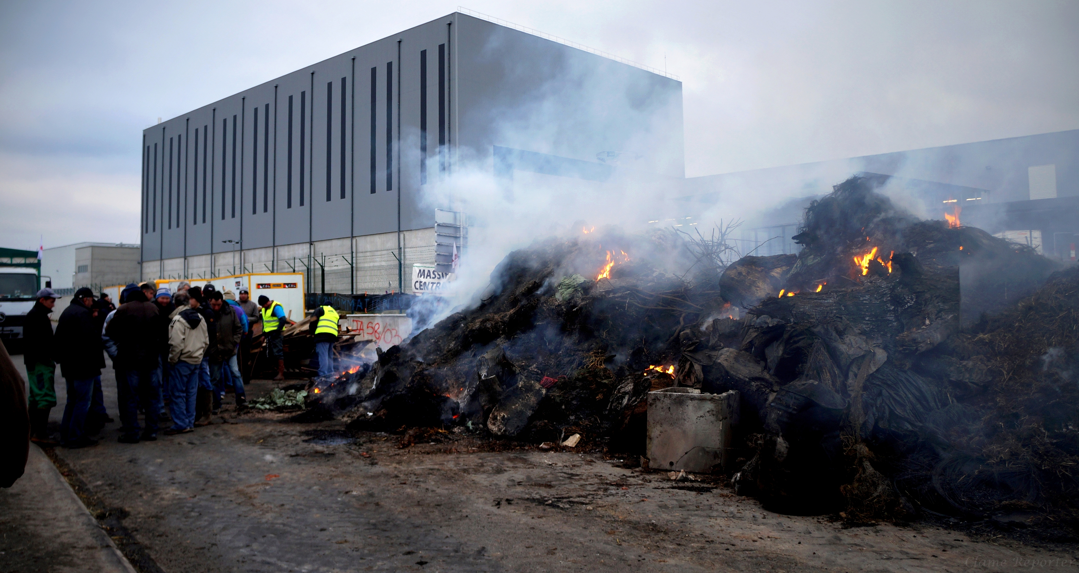 Ce Blocus de la SCA Centre Leclerc de Moulins, plateforme importante et stratégique de distribution alimentant 6 départements (soit 37 points de livraisons), avait réunit plusieurs dizaines d’Agriculteurs provenant majoritairement des régions Auvergne, Rhône-Alpes et Limousin. Ils avaient demandé auprès de l’État une revalorisation de leurs productions, une baisse des charges et ont dénoncé l'importation de viandes étrangères. Ce piquet de grève s'est terminé dans le calme, après plusieurs jours de blocage.